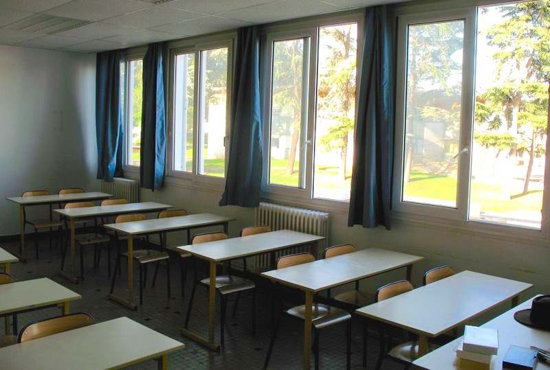 Salle de classe du lycée Claude Lebois (Saint-Chamond).